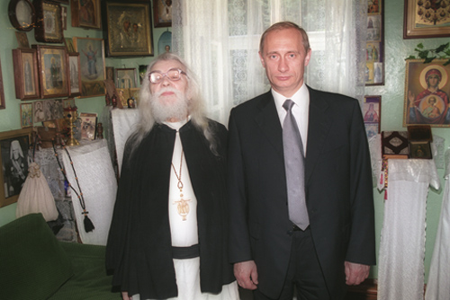 ПСКОВСКАЯ ОБЛАСТЬ. Посещение Псково-Печерского монастыря. С архимандритом Иоанном (Крестьянкиным).